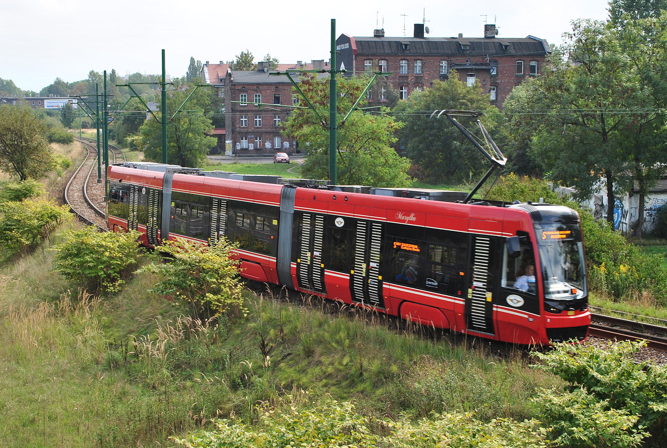 PESA Twist 2012N w pobliżu przystanku Załęże Wiśniowa (przejazd specjalny podczas parady z okazji Dnia Otwartego ZUR)